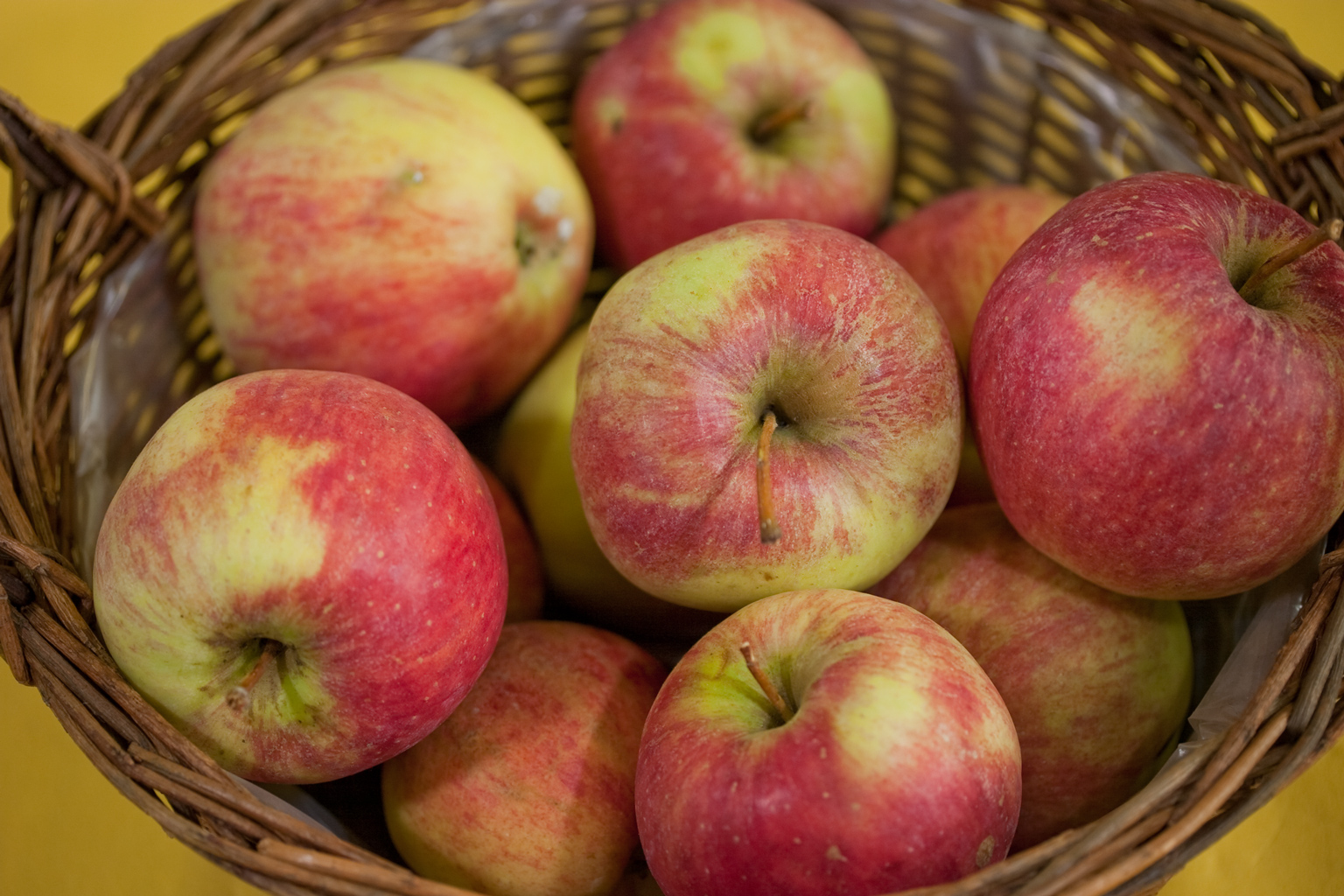 Der Reanda ist eine durch Kreuzung von 'Cliva' und einem Zuchtklon entstandene neue Spätherbstsorte. Die Neuzüchtung entstand im Institut für Obstforschung Dresden-Pillnitz. Sortenschutz besteht seit 1994. Die Sorte ist schorfresistent. Im Geschmack ist der Apfel säuerlich aromatisch. Der Baum ist schwach wachsend, für Haus- und Kleingarten geeignet, nicht jedoch für Obstwiesen. Die Sorte ist von November bis Januar genussreif.